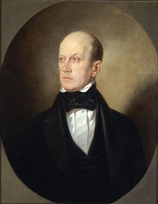 Портрет П. Я. Чаадаев